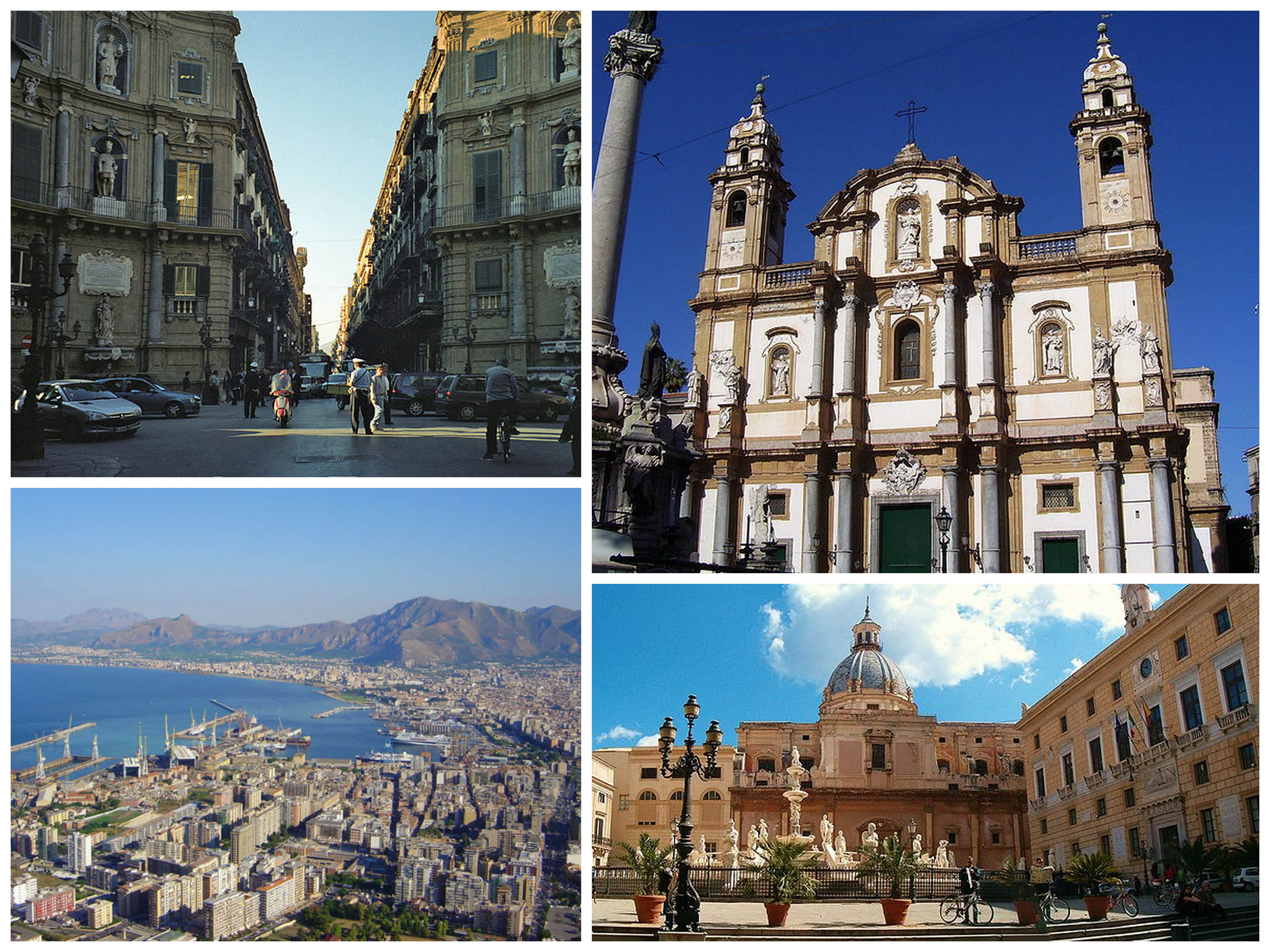 Collage di varie foto di Palermo